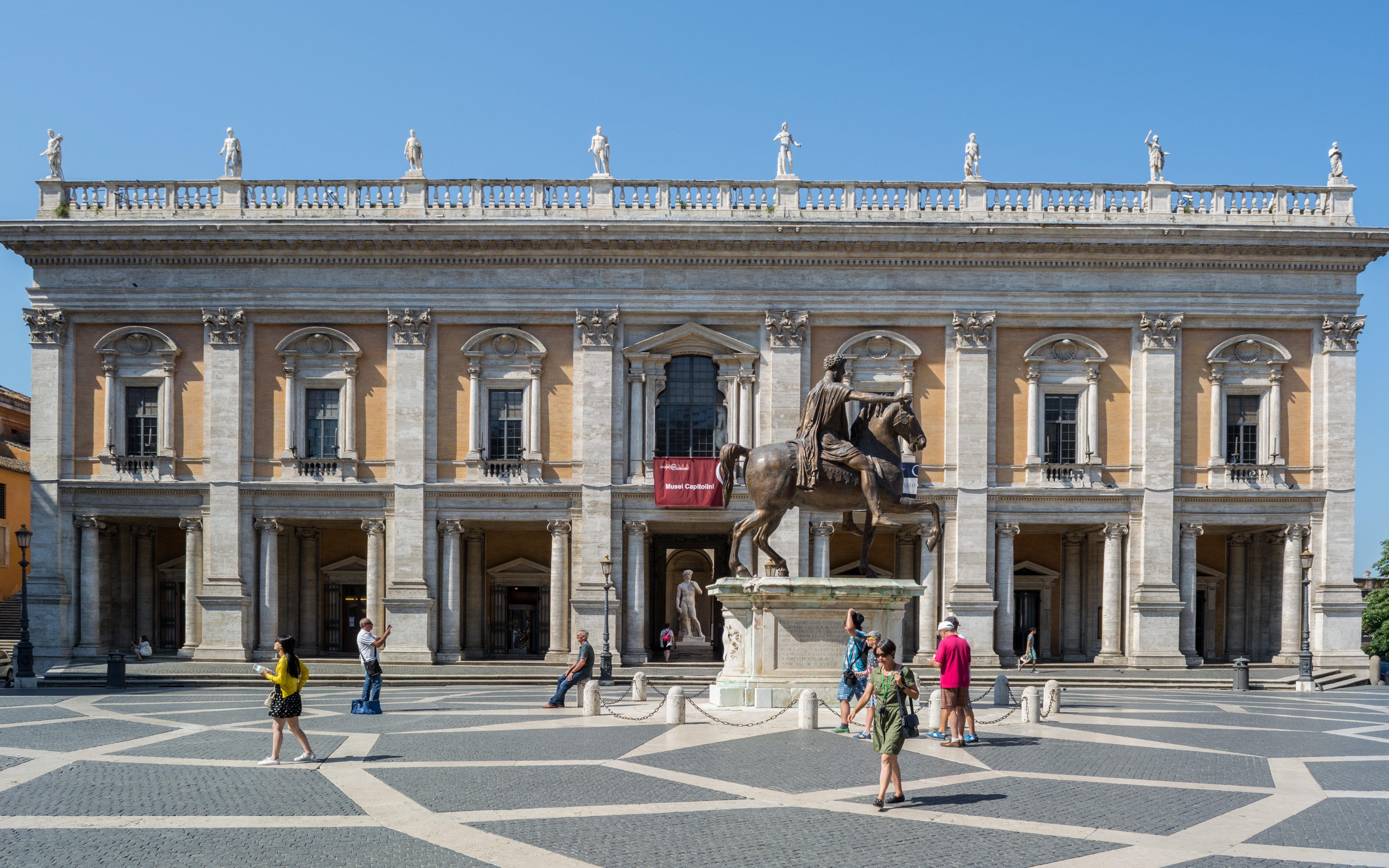 Piazza del Campidoglio, Rome